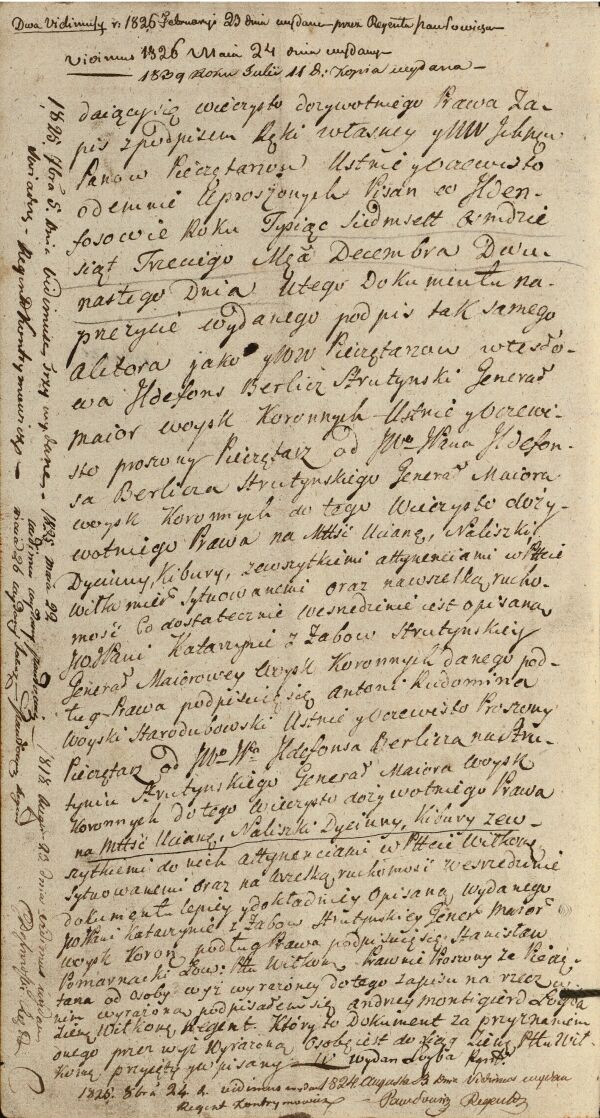 Ildefonso Berlič Strutynskio raštas, kuriuo jis savo žmonai Kotrynai Žabaitei Strutynskai užrašo Utenos dvarą ir kitas valdas. 1784-01-03. LVIA. F. 79, ap. 1, b. 16, l. 8 a. p.